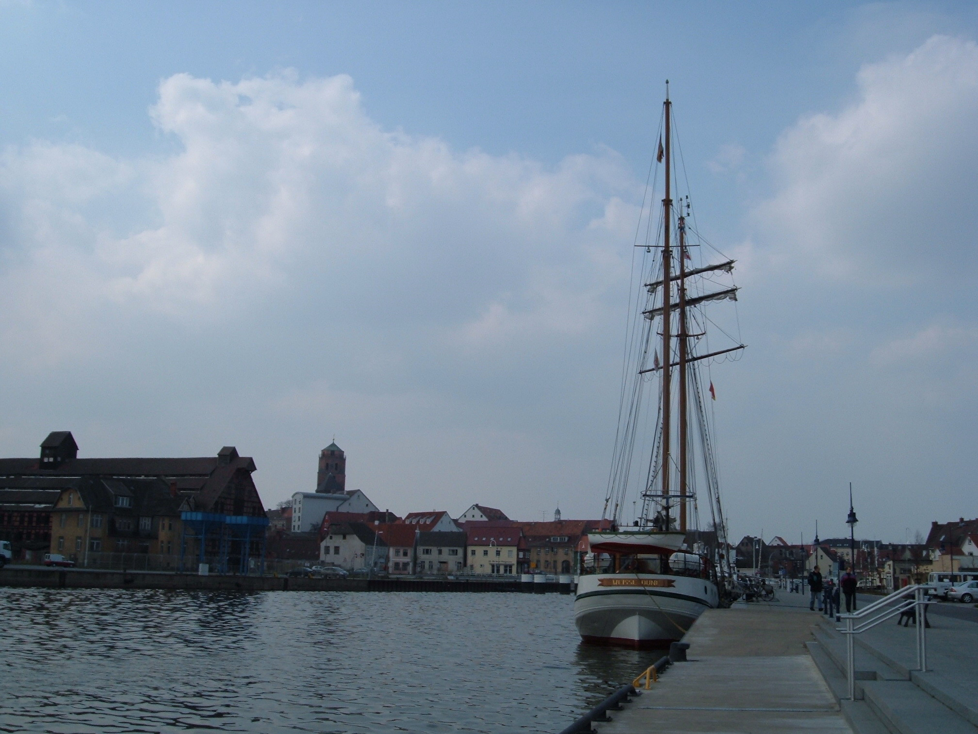 Wolgast Пристань